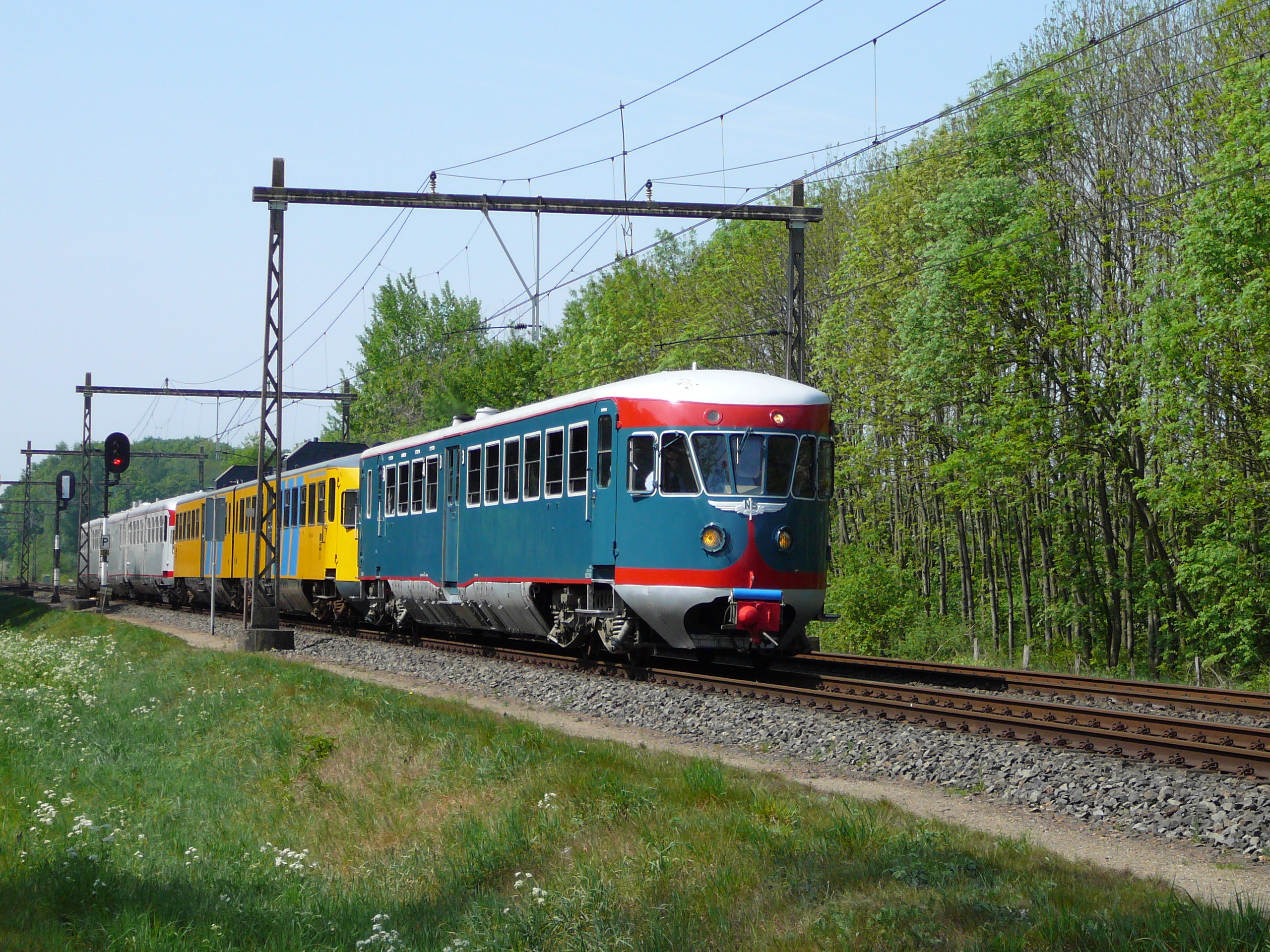 Blauwe Engelen 41 en 186 brengen DE3 27 van Utrecht naar Tilburg